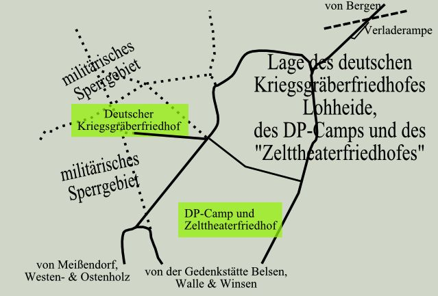 Lage des deutschen Kriegsgräberfriedhofes Lohheide bei Bergen/Belsen